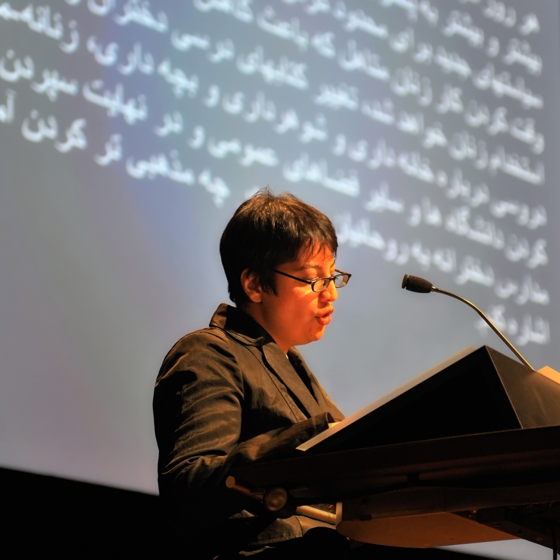 Shadi Sadr, Iraanse winnares Mensenrechtentulp 2009. Radio Zamaneh presenteerde debatavond over mensenrechten en persvrijheid in Iran.